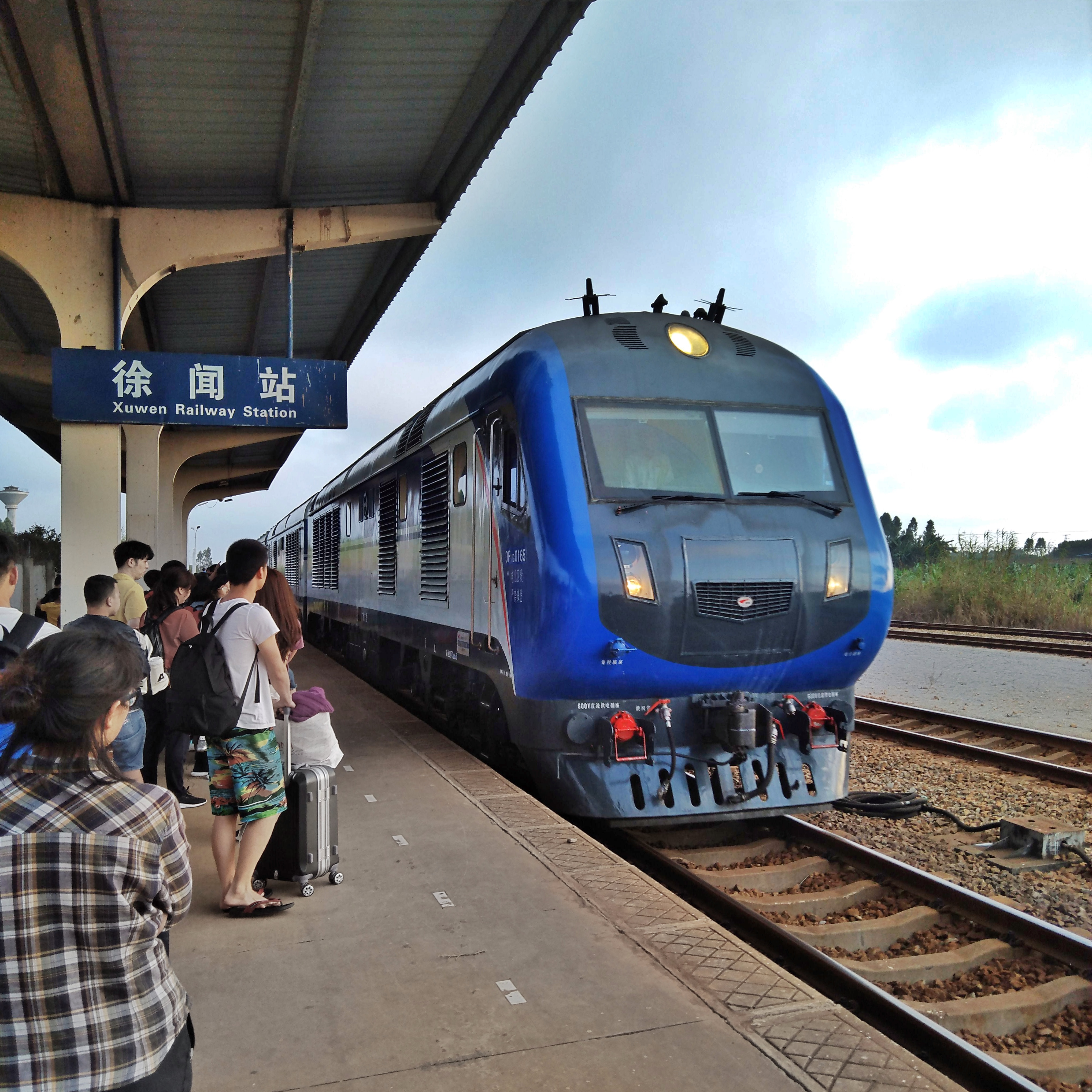 DF11G-0165 牵引 K458 次列车驶入徐闻站